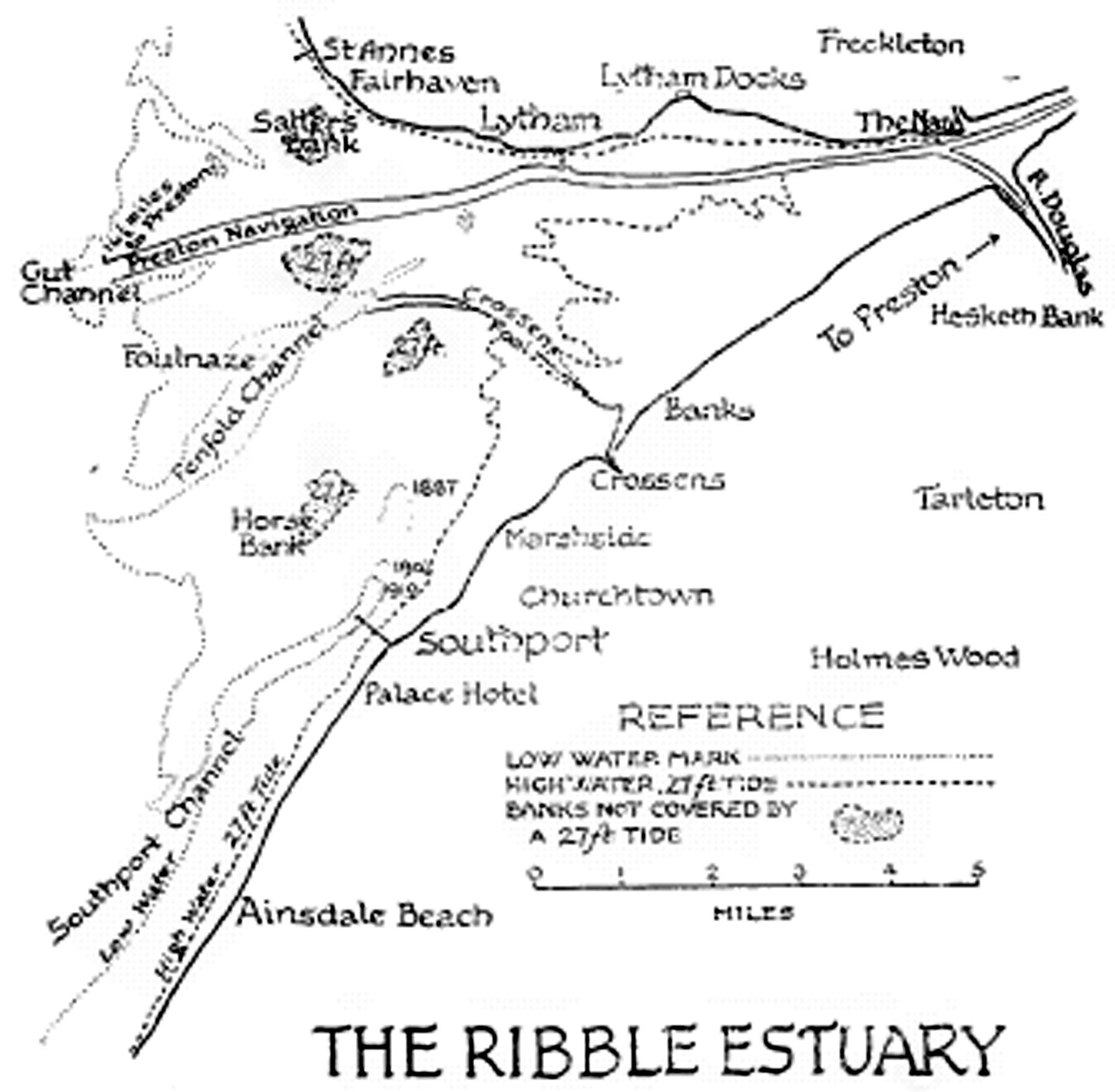 Map Ribble Estuary, 1917